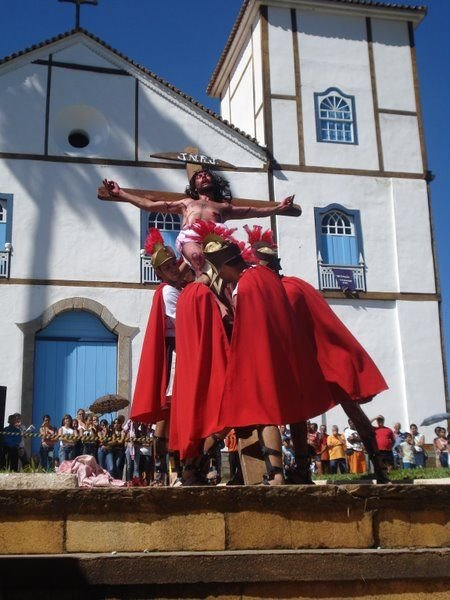 Semana Santa - Via Sacra